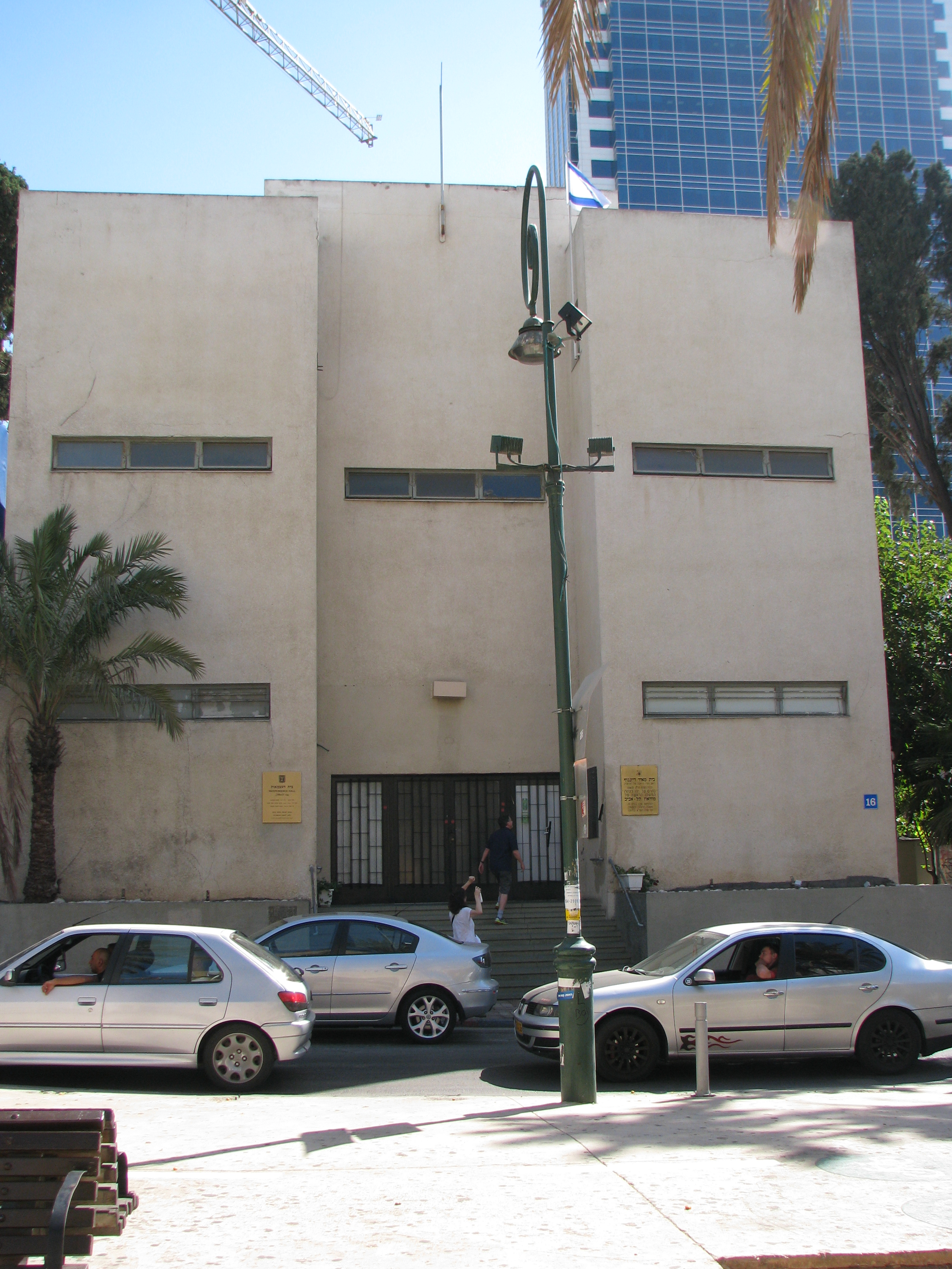 היכל העצמאות הוא המקום בו נערך טקס הכרזת העצמאות של מדינת ישראל. בית העצמאות, ביתם של צינה ומאיר דיזינגוף, מבתיה הראשונים של תל אביב. הבית שנבנה בשנת 1910 על ידי מאיר דיזנגוף ונבחר לארח את טקס הכרזת המדינה בשנת 1948 וכיום הוא משמש מוזיאון היסטורי לתולדות ההכרזה ההיא, תחת השם בית העצמאות. המסע מתחיל עם הרצל, עובר דרך הקמת תל-אביב ופועלו של דיזנגוף, ומסתיים באולם הכרזת העצמאות, עם שחזור מלא של ההודעה המרגשת בקולו של בן גוריון.